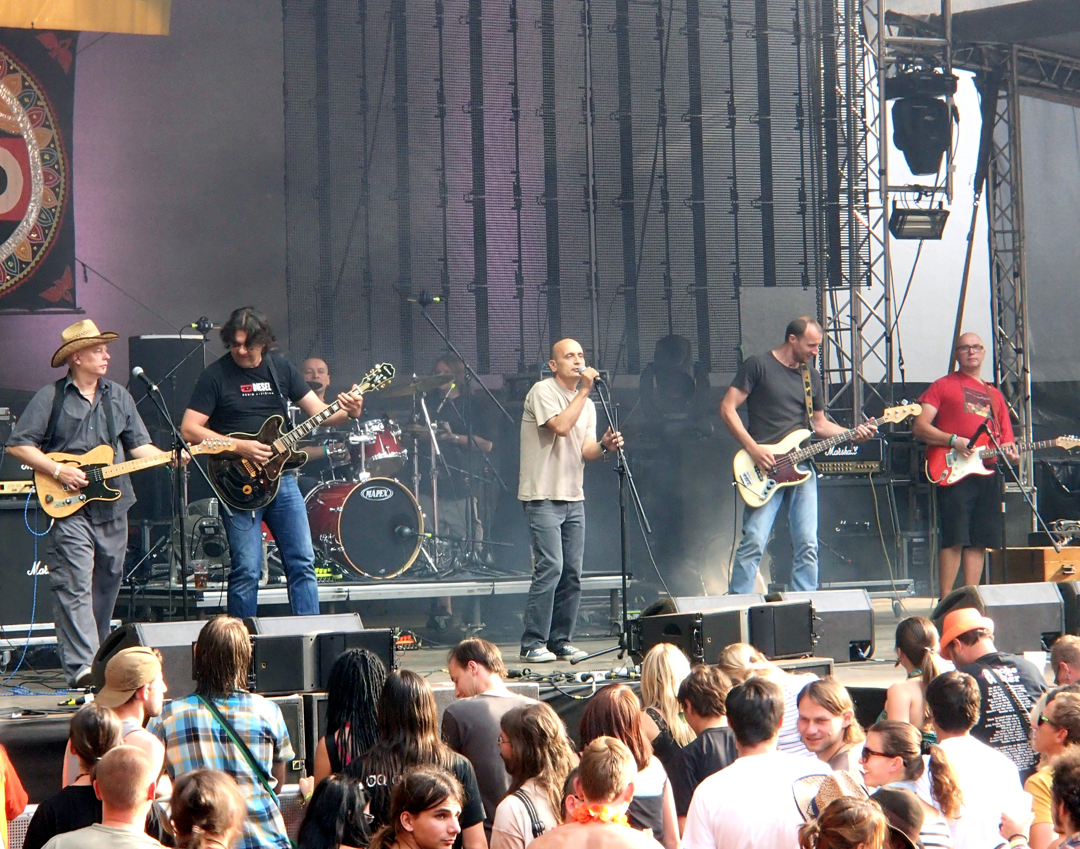 Garage & Tony Ducháček na Trutnově 2013